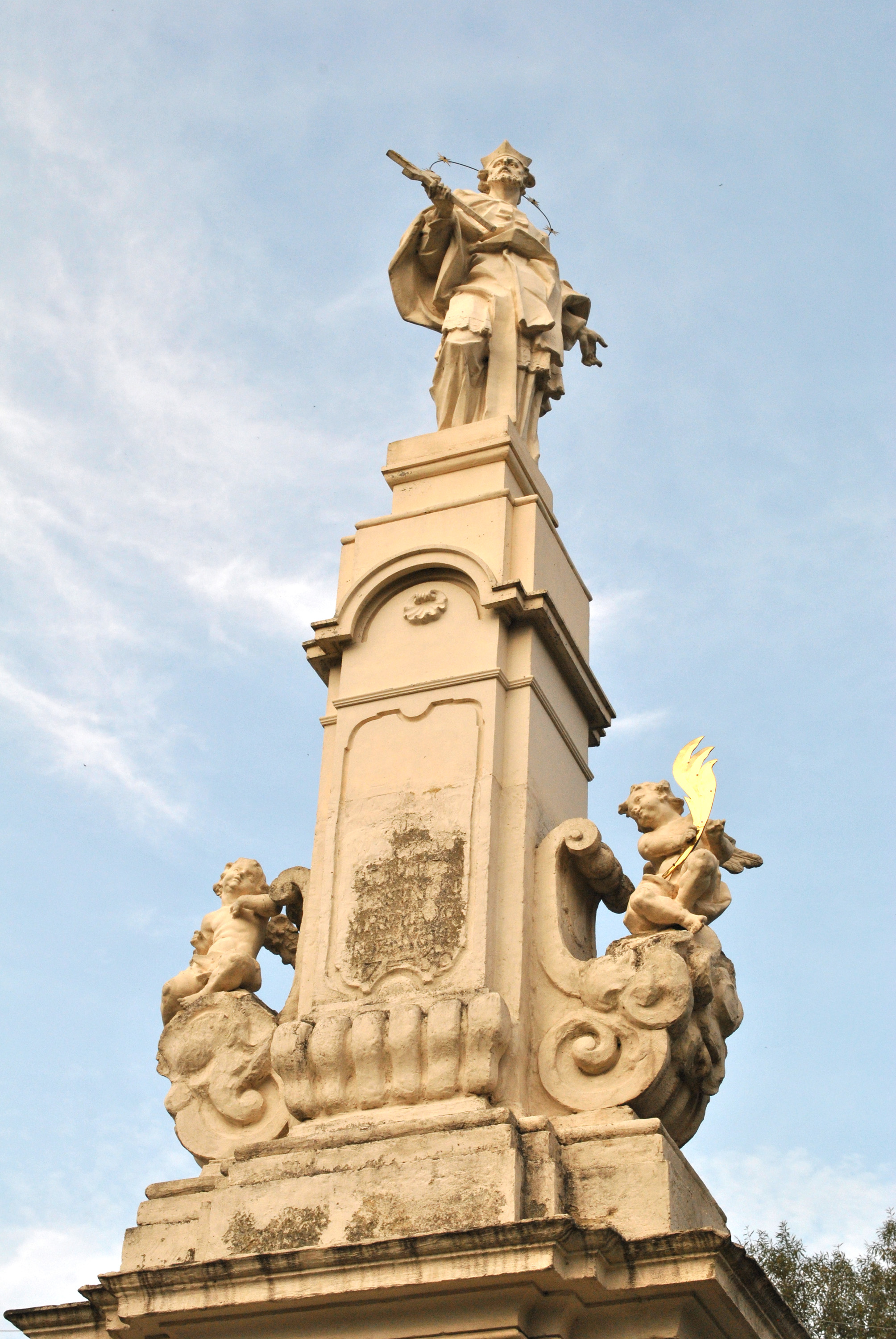 Скульптура св. Іоанна (Яна Непомука) в Бучачі Тернопільської області.